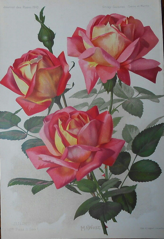 Rose hybride de thé Pernetiana 'Juliet' de William Paul, illustration in Journal des roses, 1910.